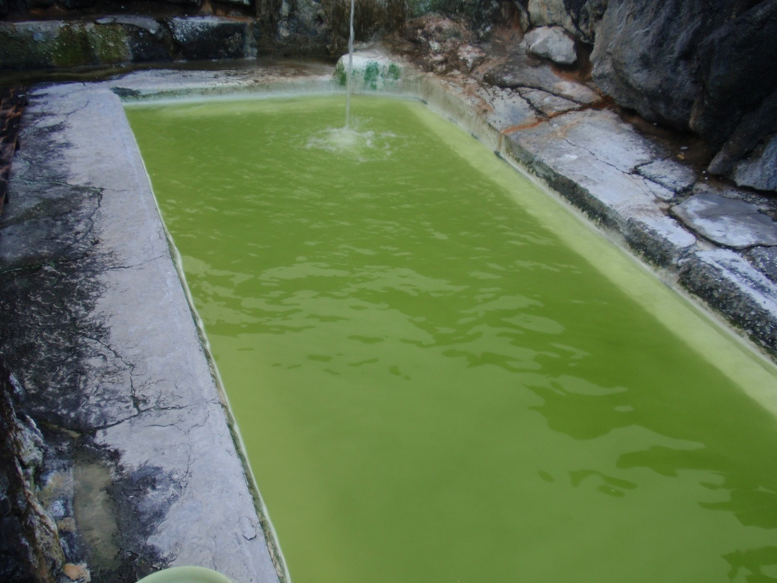 石塚旅館露天風呂